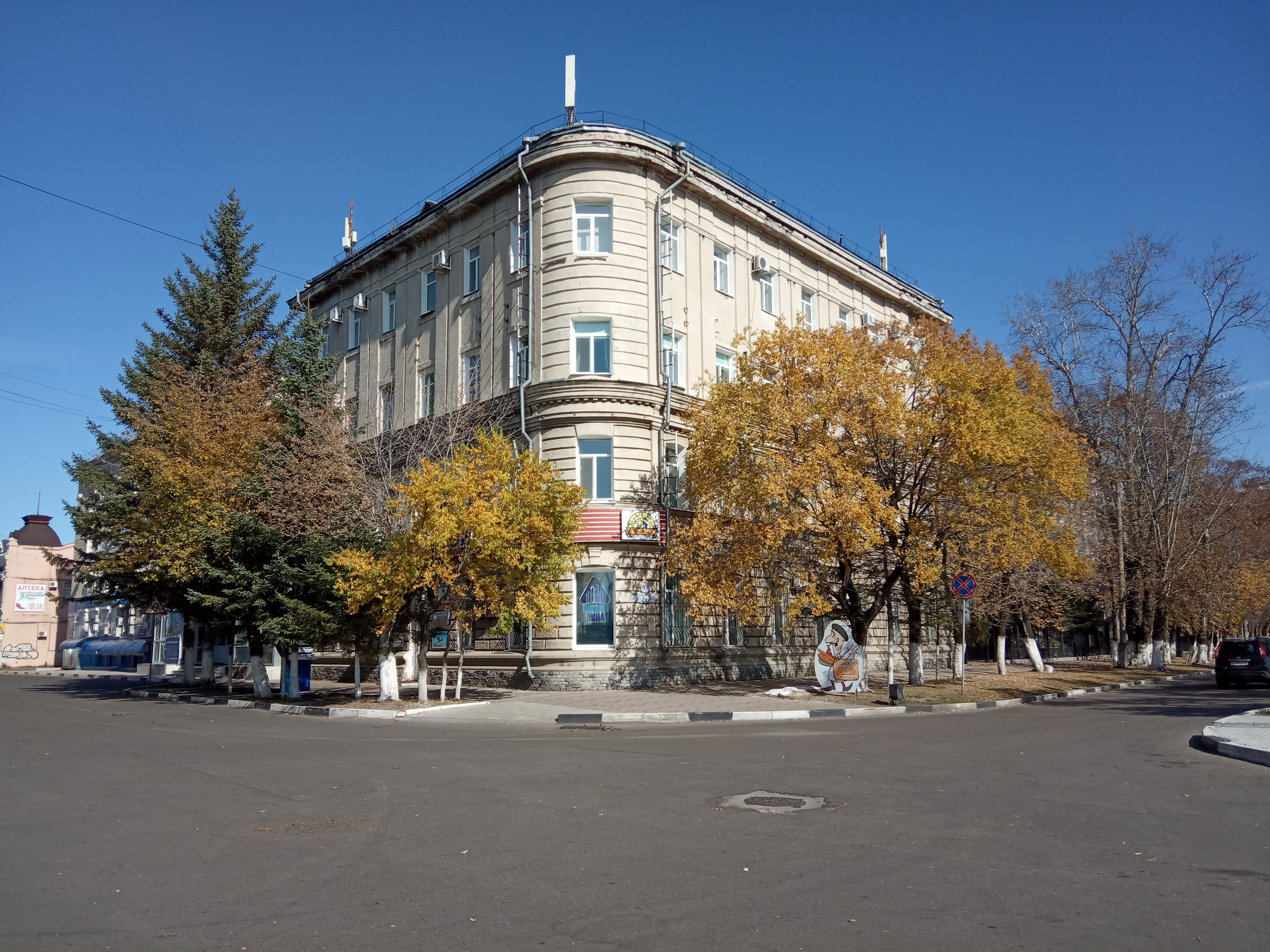 Перекресток Краснофлотская - Св. Иннокентия